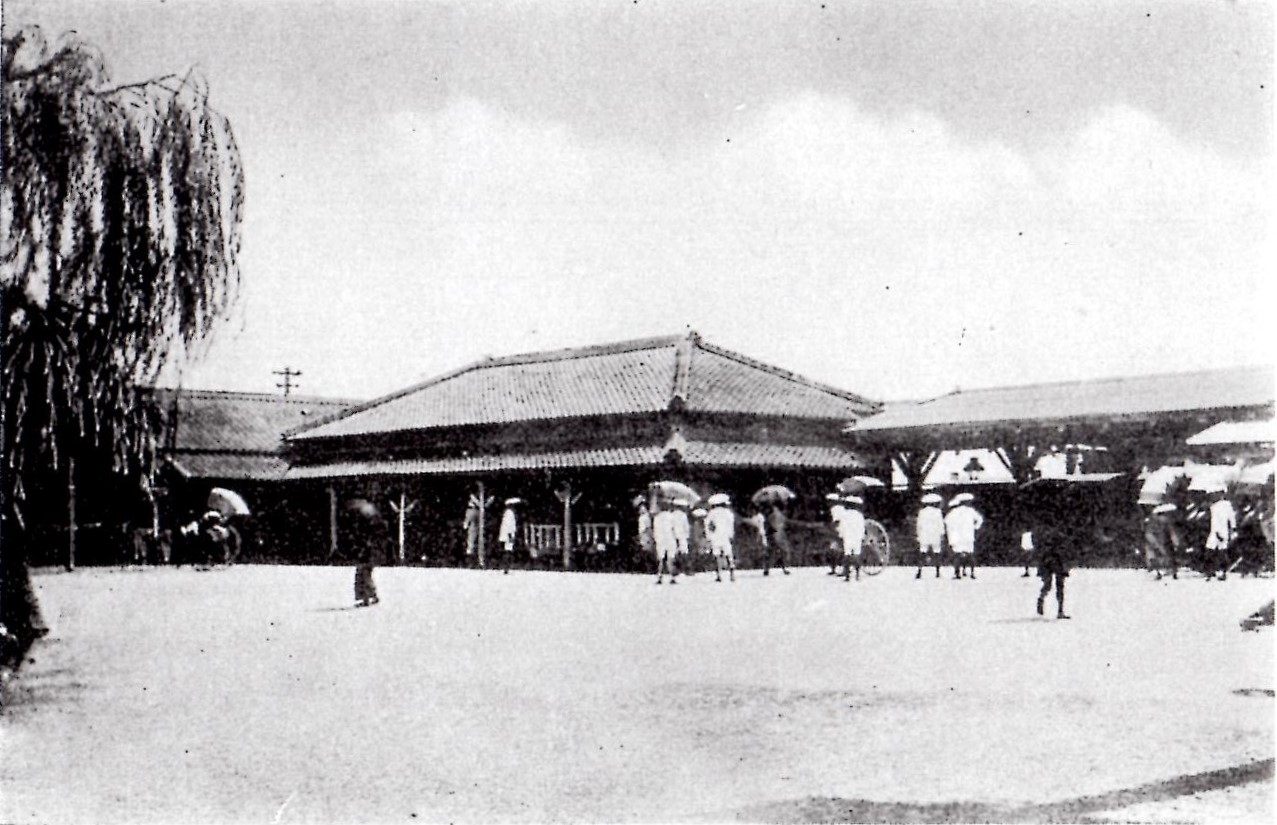 東海道本線開通（1888年/明治21年）当時の豊橋駅。愛知県豊橋市。